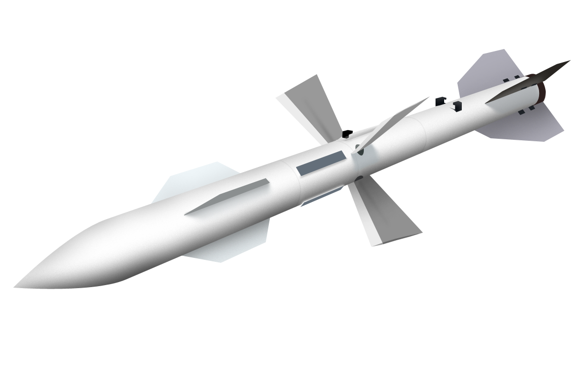 AA-10 Alamo (Vympel NPO R－27R)